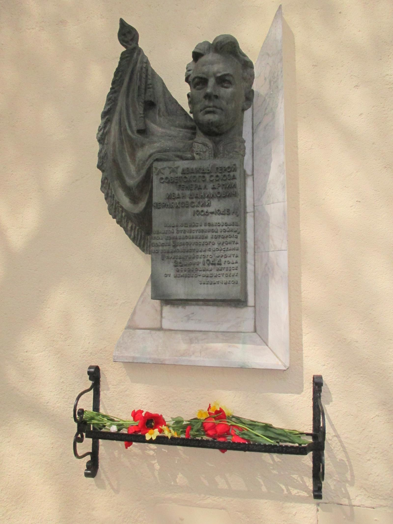 Черняховский